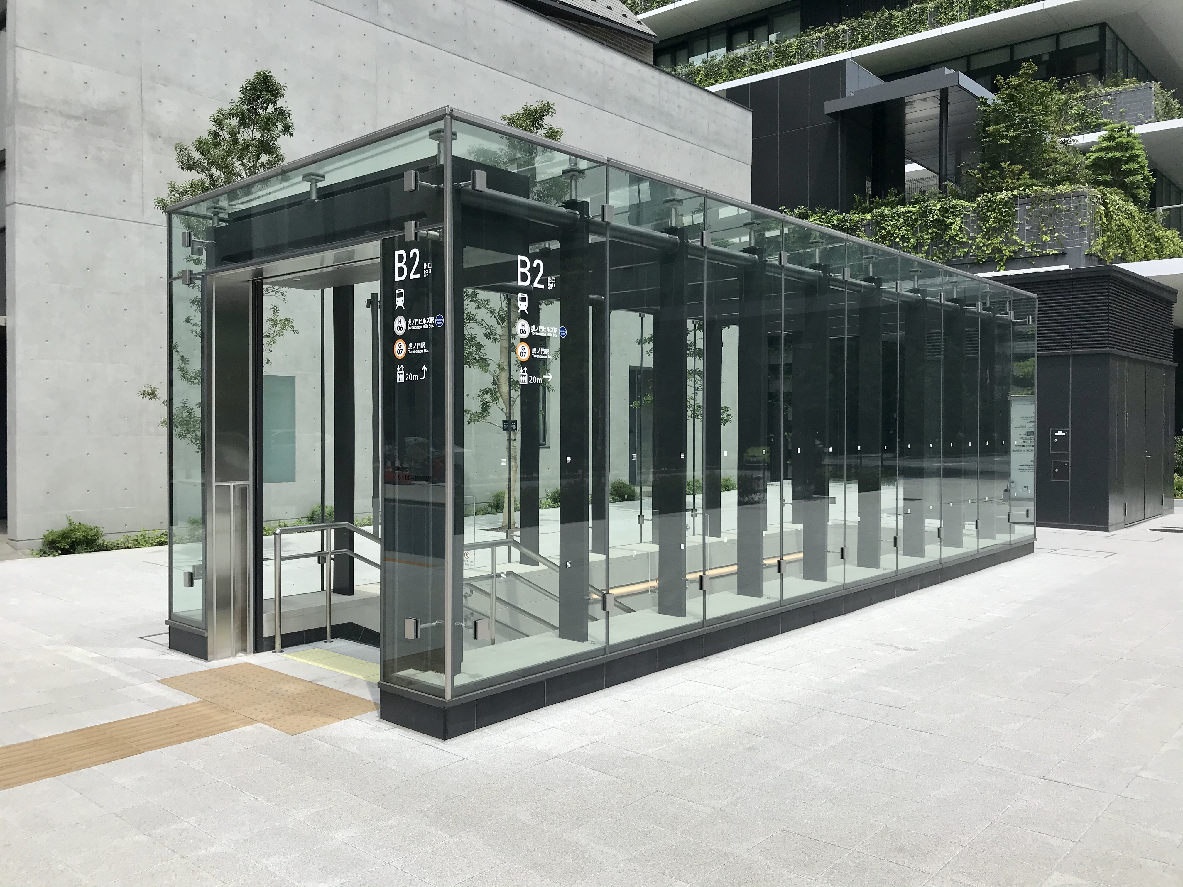 東京メトロ日比谷線虎ノ門ヒルズ駅B2番出入口